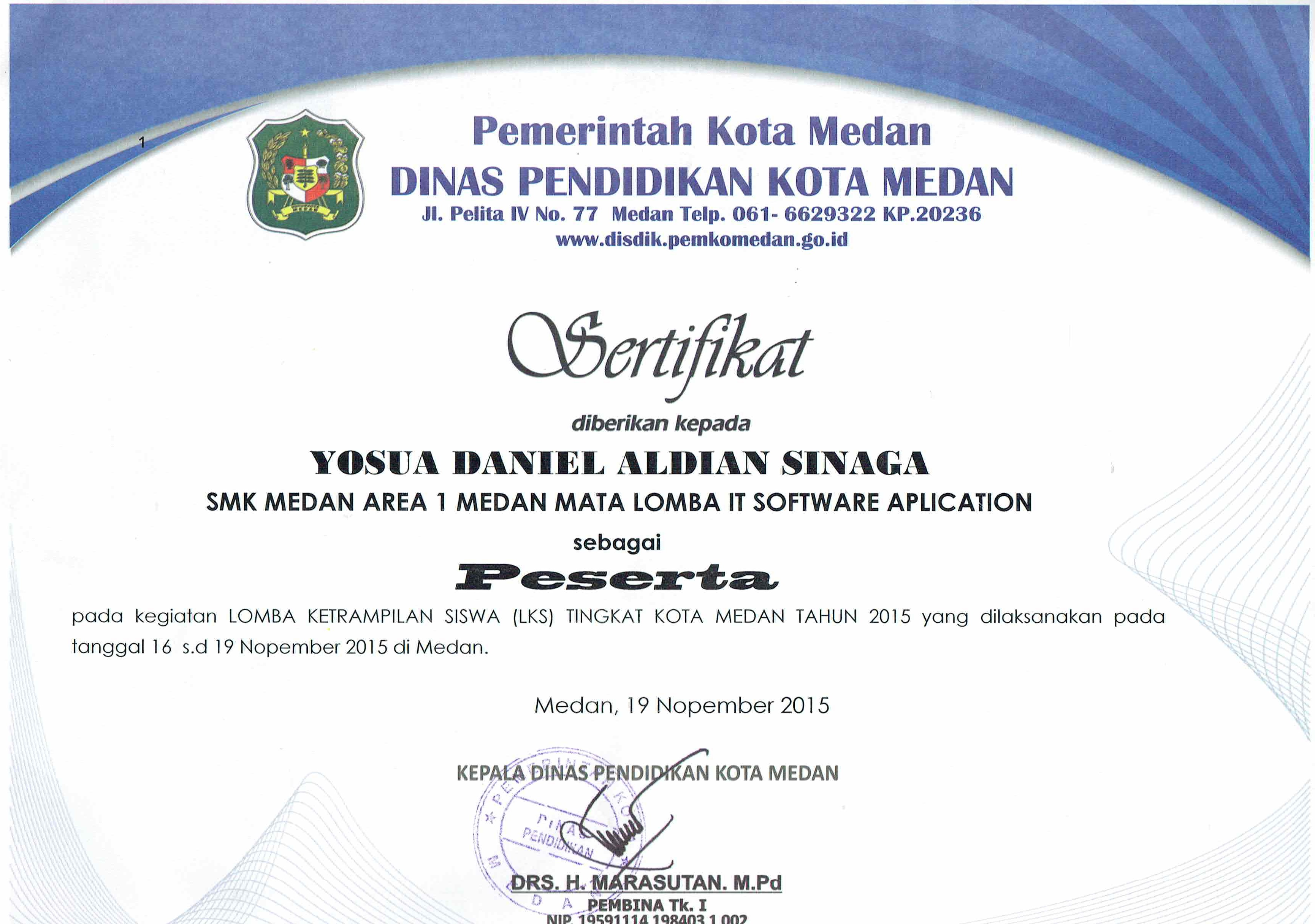 Sertifikat Lomba Ketrampilan Siswa Tingkat Kota Medan Tahun 2015